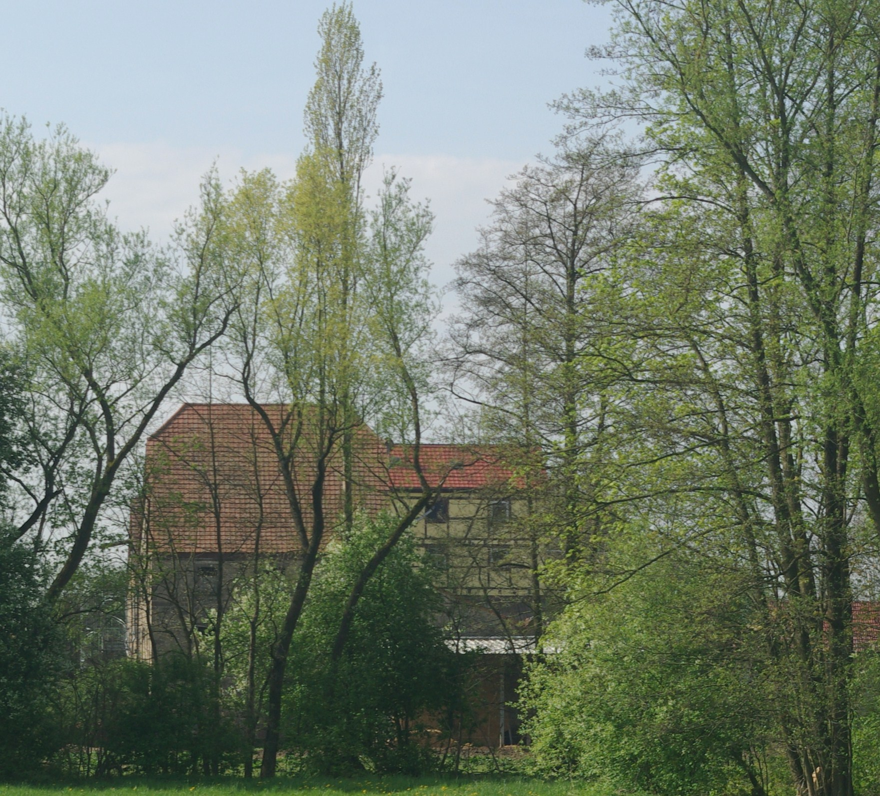 Wiesenmühle bei Niederwerrn Anfang Mai 2008